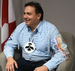 La ministre McKenna rencontre le Chef national, Perry Bellegarde, de l’Assemblée des Premières Nations (Canada) le 1er décembre 2015 pour discuter des mesures qui s’imposent pour lutter contre changement climatique.